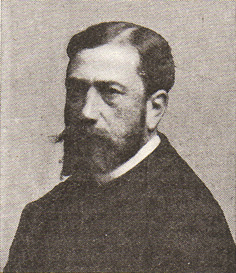 Paul Vayson (1842-1911)